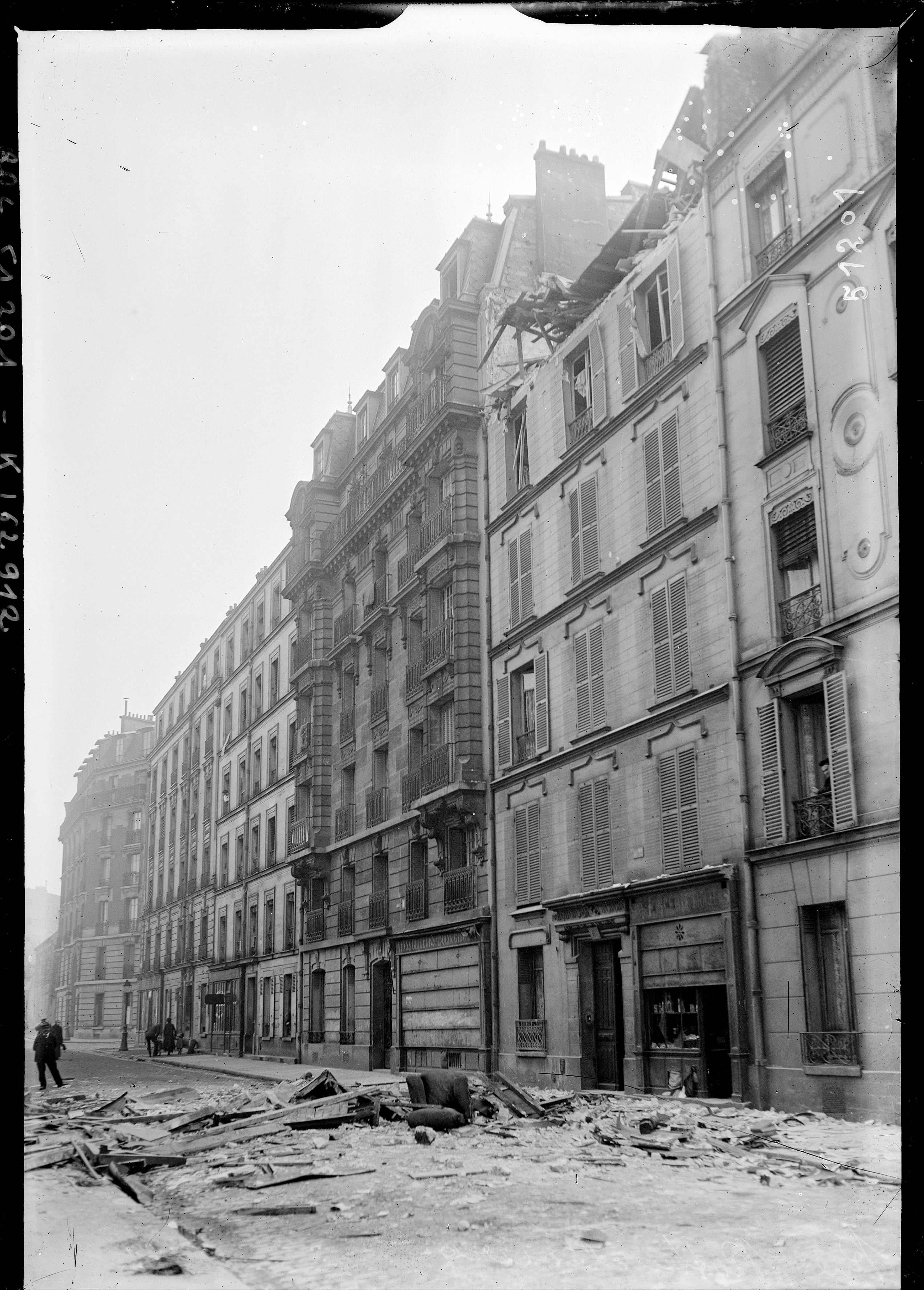 8 rue Rottembourg après le bombardement du 11 mars 1918